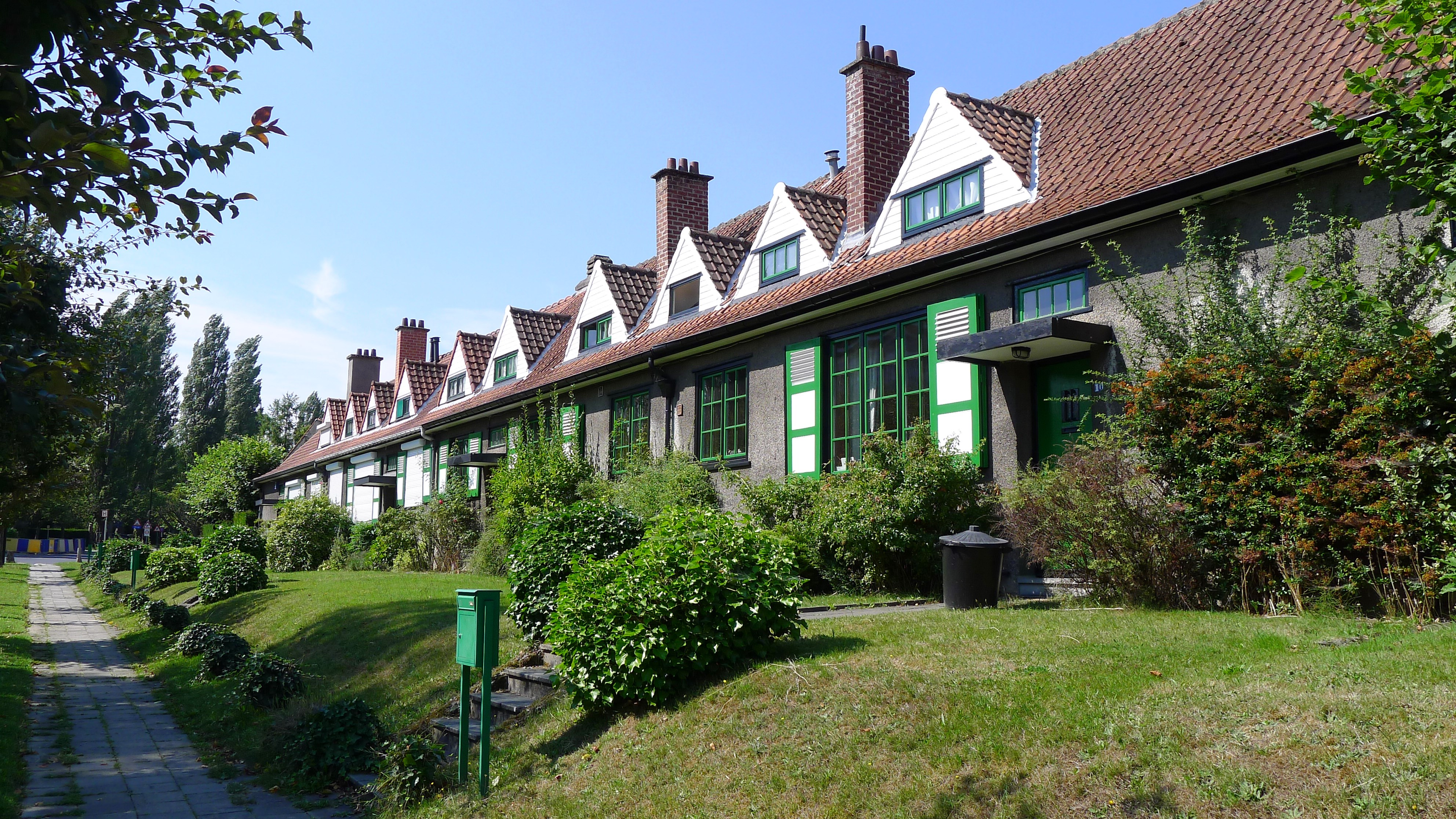 Cité-jardin Le Logis